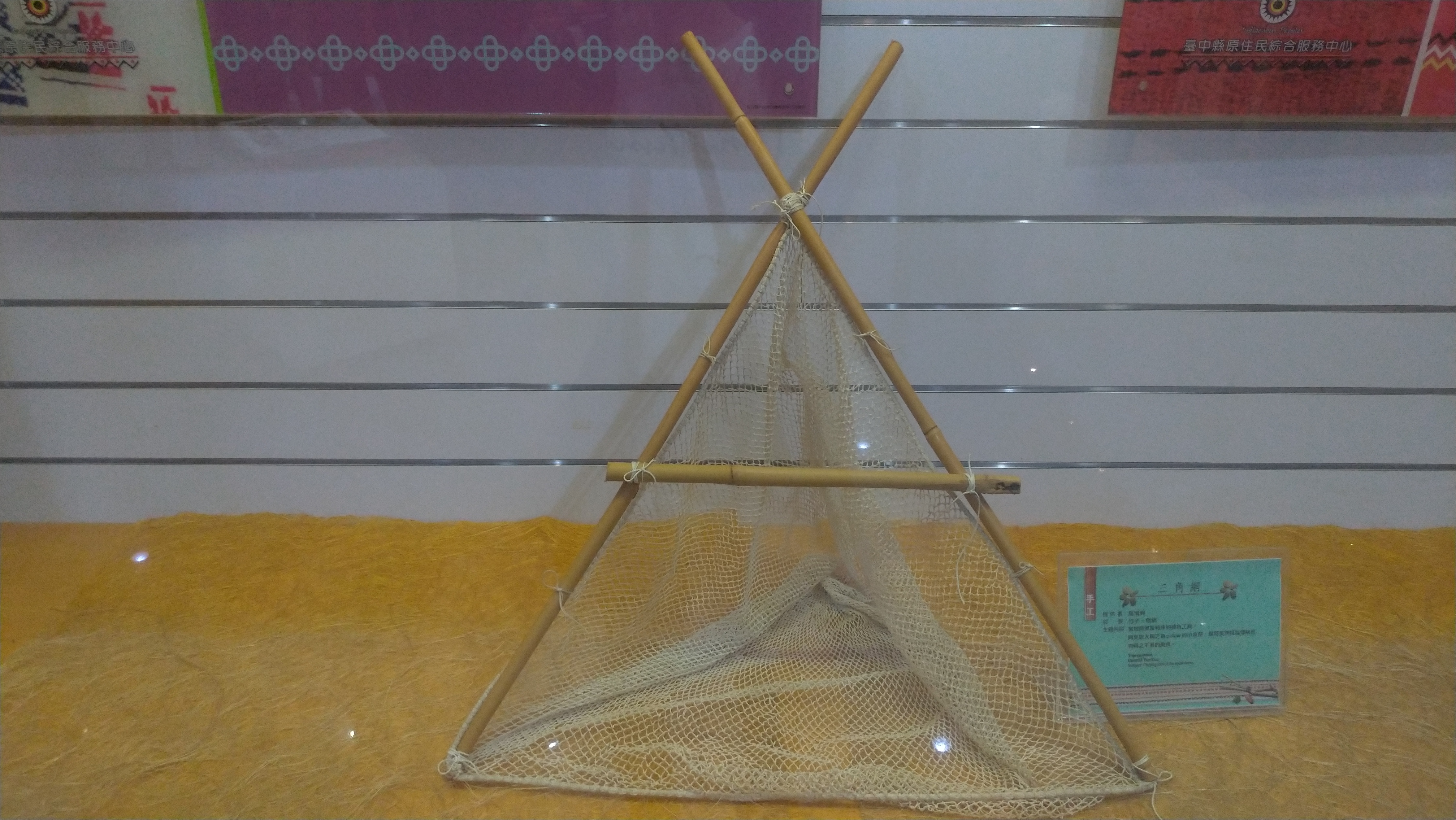 中文（台灣）: 台灣原住民，手工，三角網